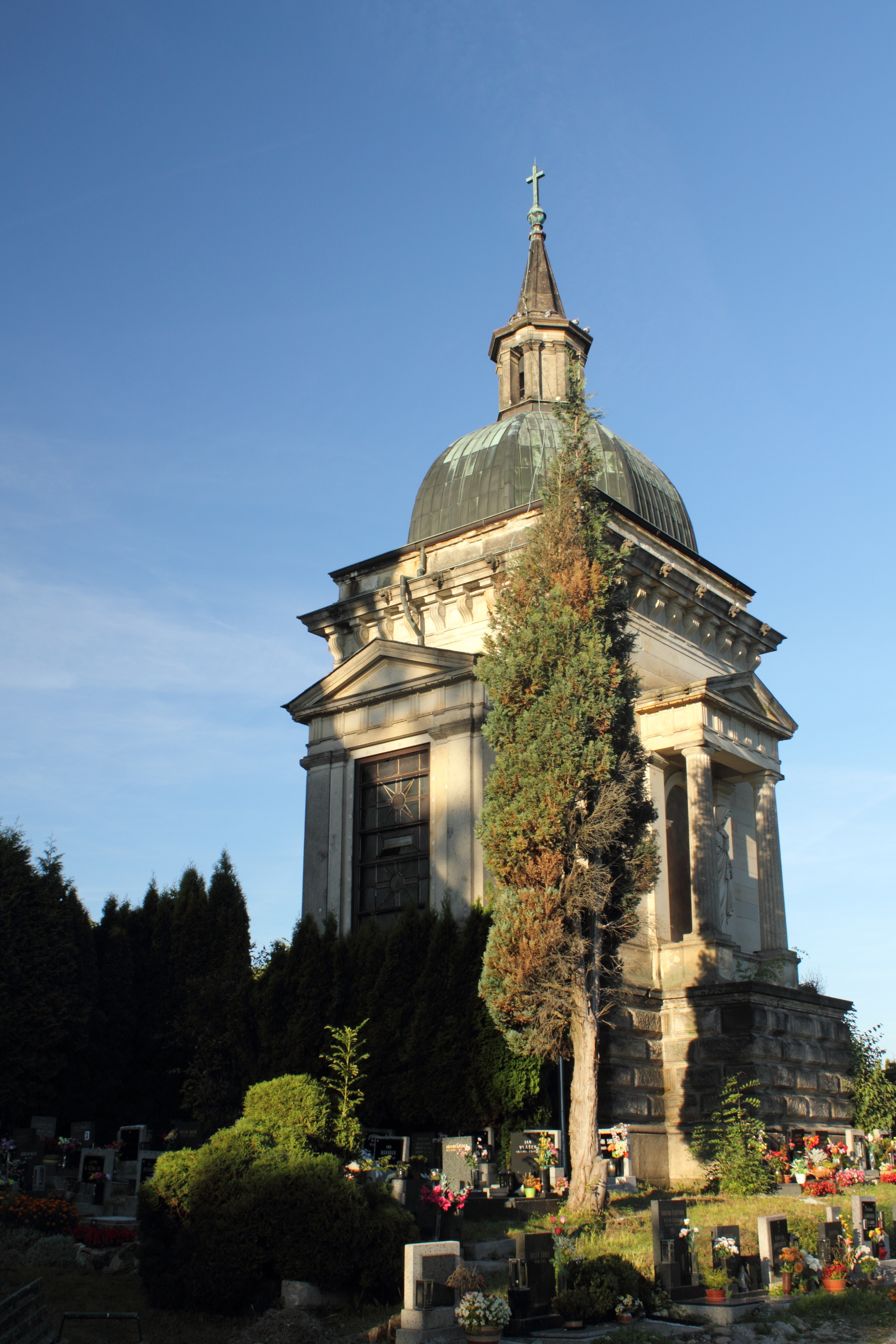 Hrobka rodiny Schmittů, Český Dub